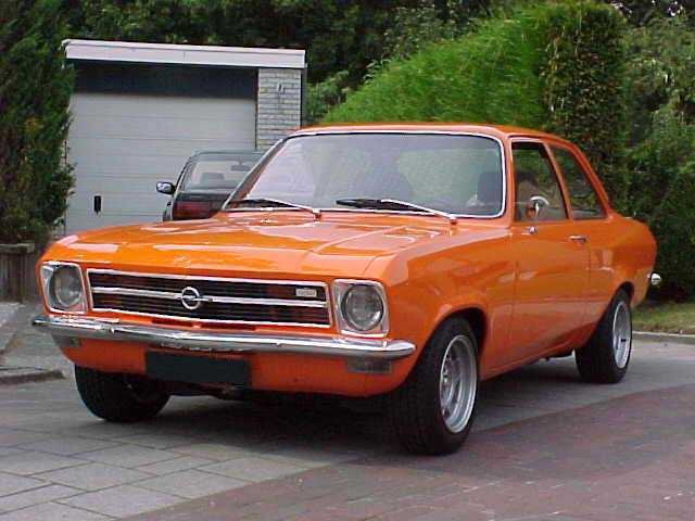 Opel Ascona A, 1972